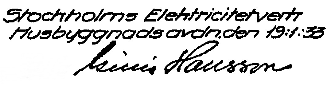 Gillis Hansson signatur på en ritning för Danviksstationen